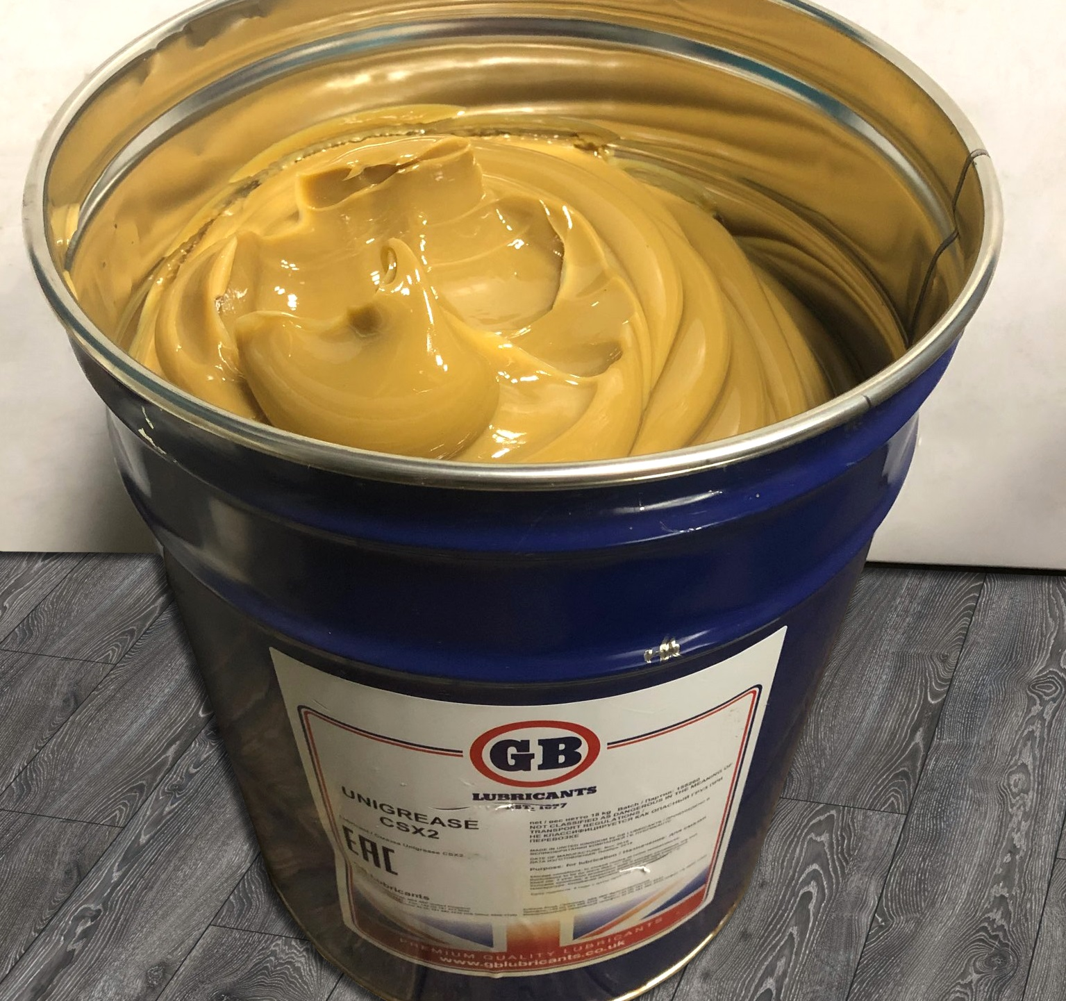 Пластичная смазка GB Lubricants